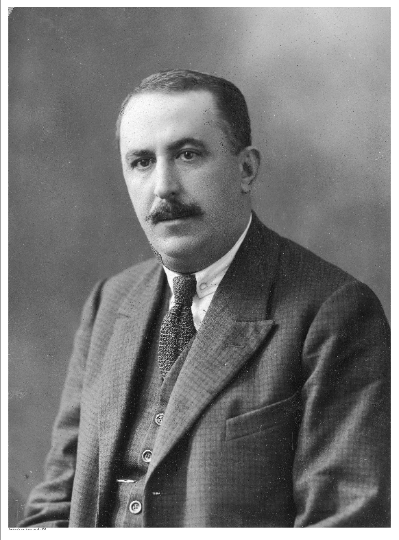 Портретна фотография на Цвятко Бобошевски, български политик министър и регент.